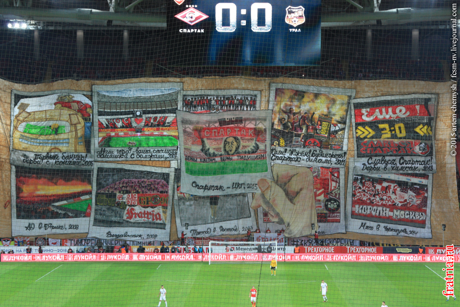 Перформанс, посвящённый 10-летию "Фратрии"